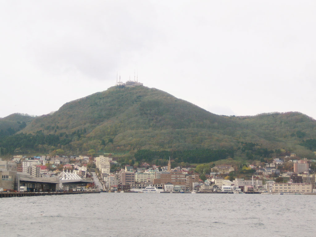 Mt. Hakodate (函館山 Hakodate-yama), Hakodate, Hokkaidō, Japan